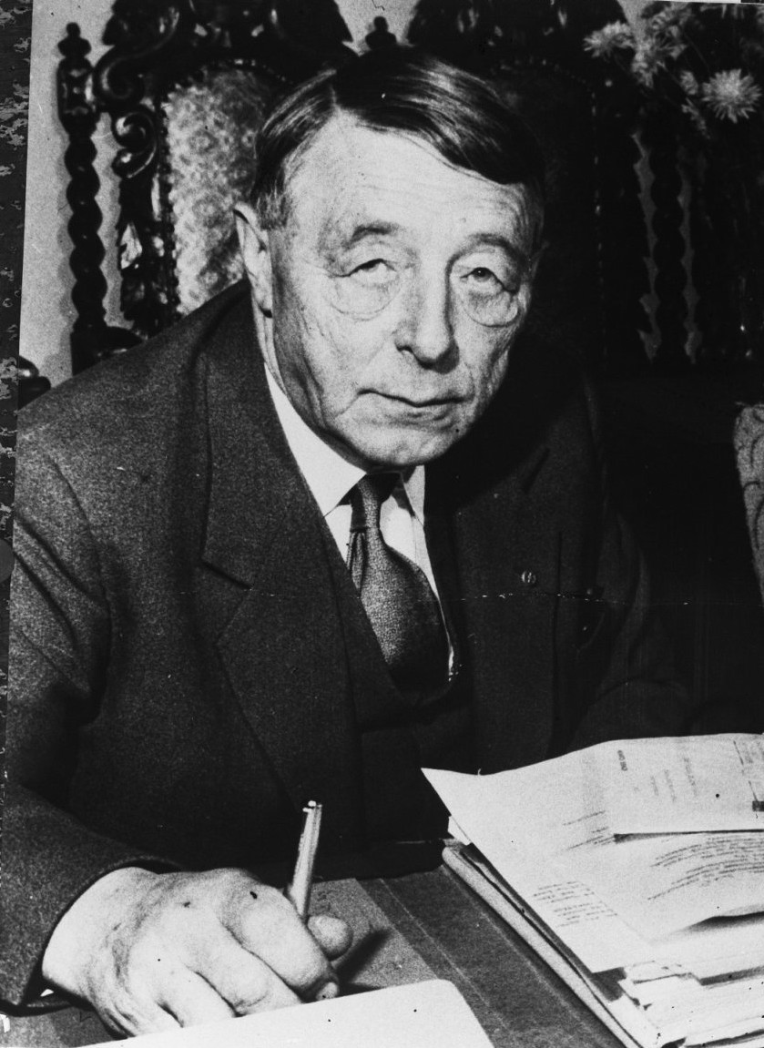 Bisschop Fjellbu zal huwelijk van Prinses Astrid (Noorwegen) inzegenen